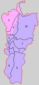 秋田県鹿角郡の町村。